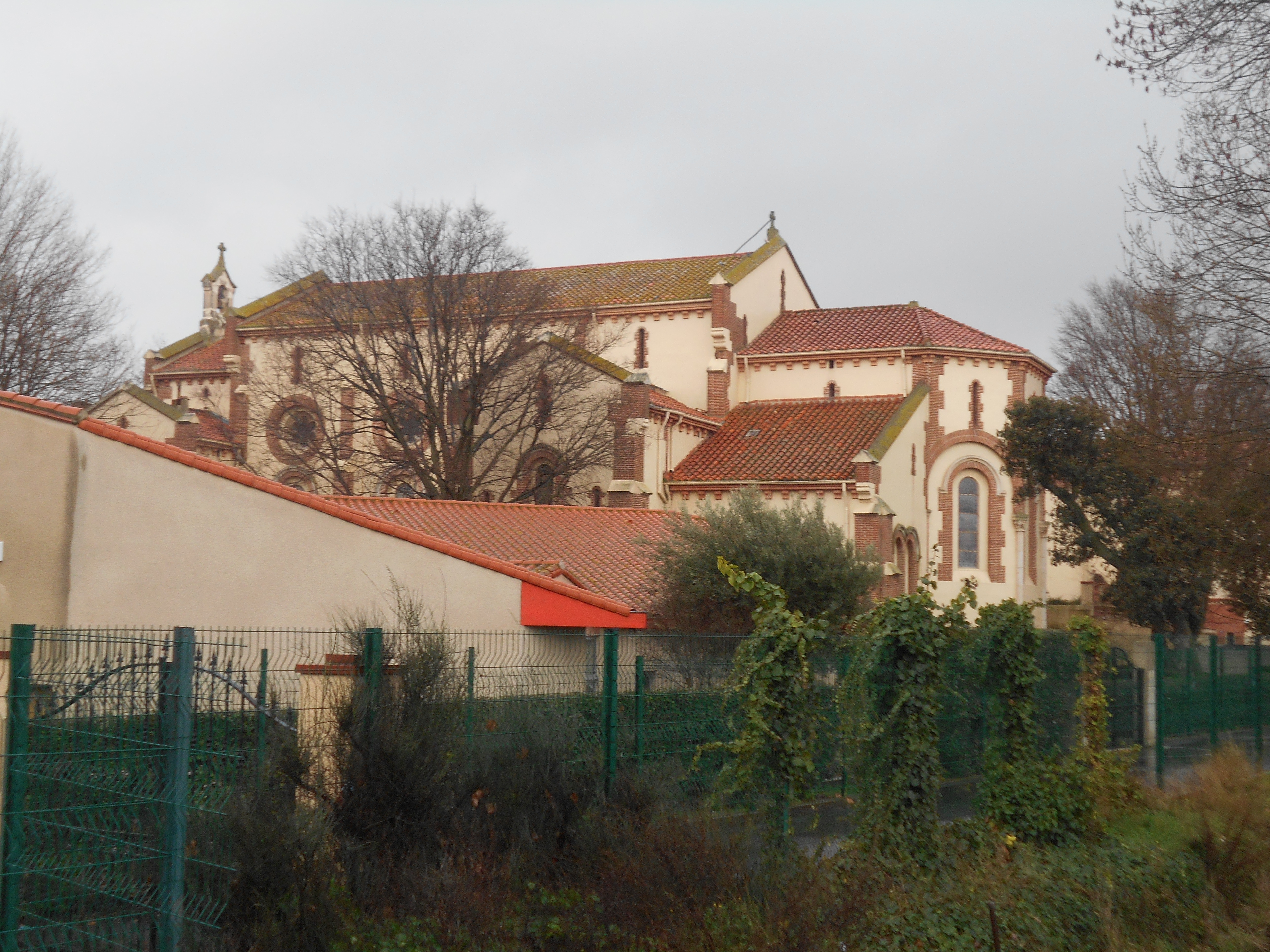 L'església de Sant Lluís Gonzaga de Perpinyà